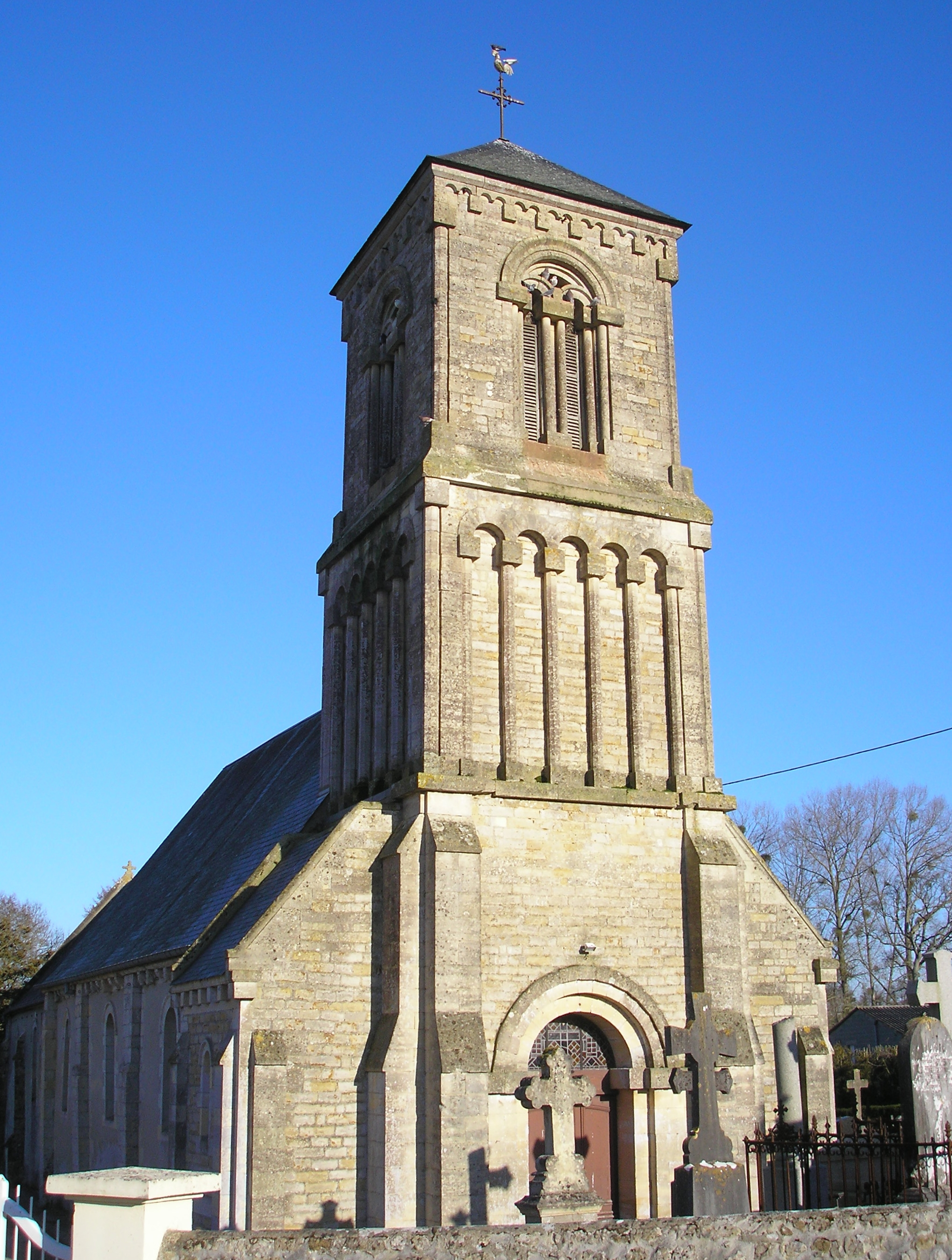 Bucéels (Normandie, France). L'église Saint-Germain.